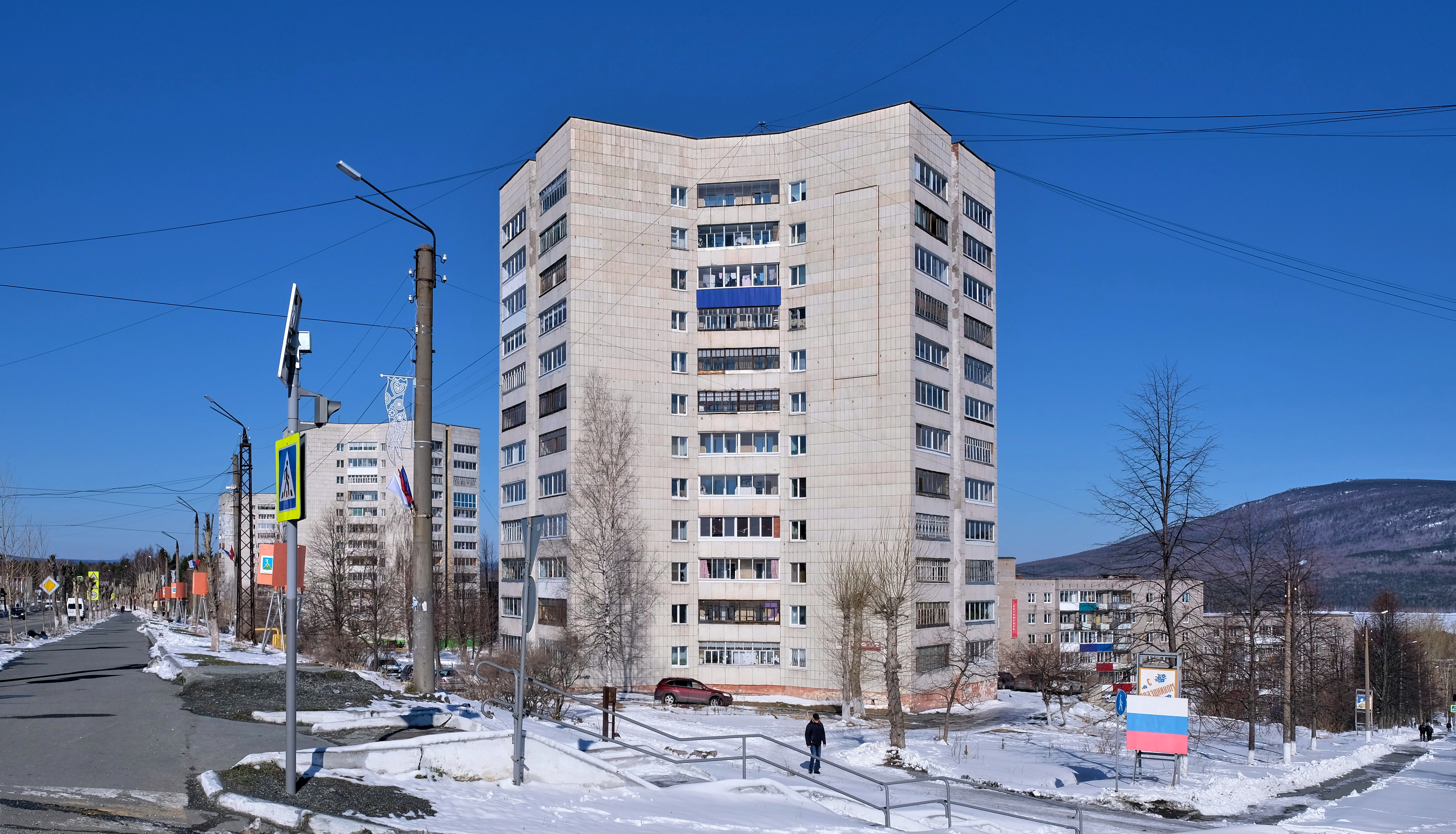 12-ти-этажные дома (№ 12, 14, 16) на ул. Свердлова в Качканаре